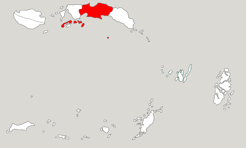 Округ Центральне Малуку